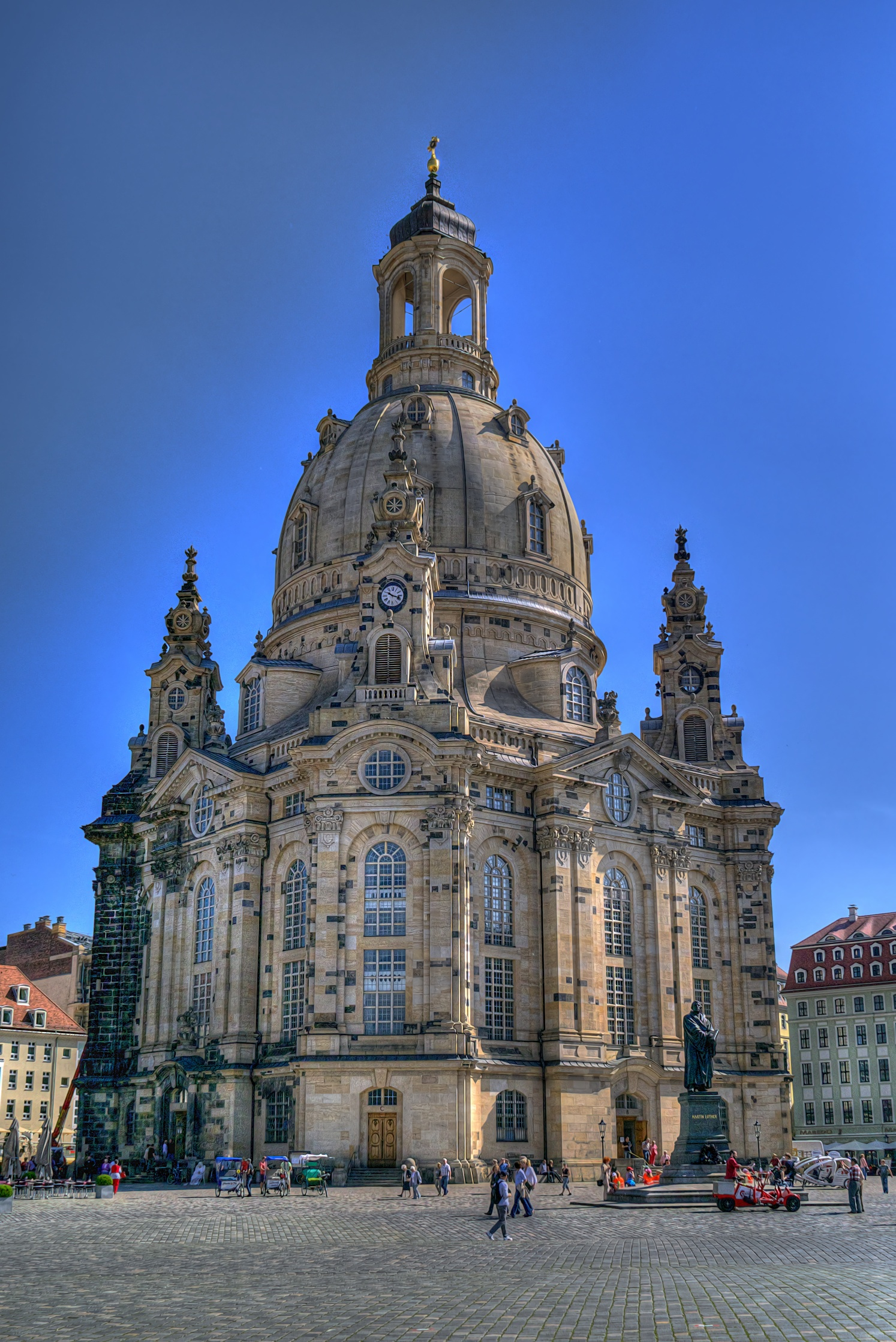 Dresden Frauenkirche